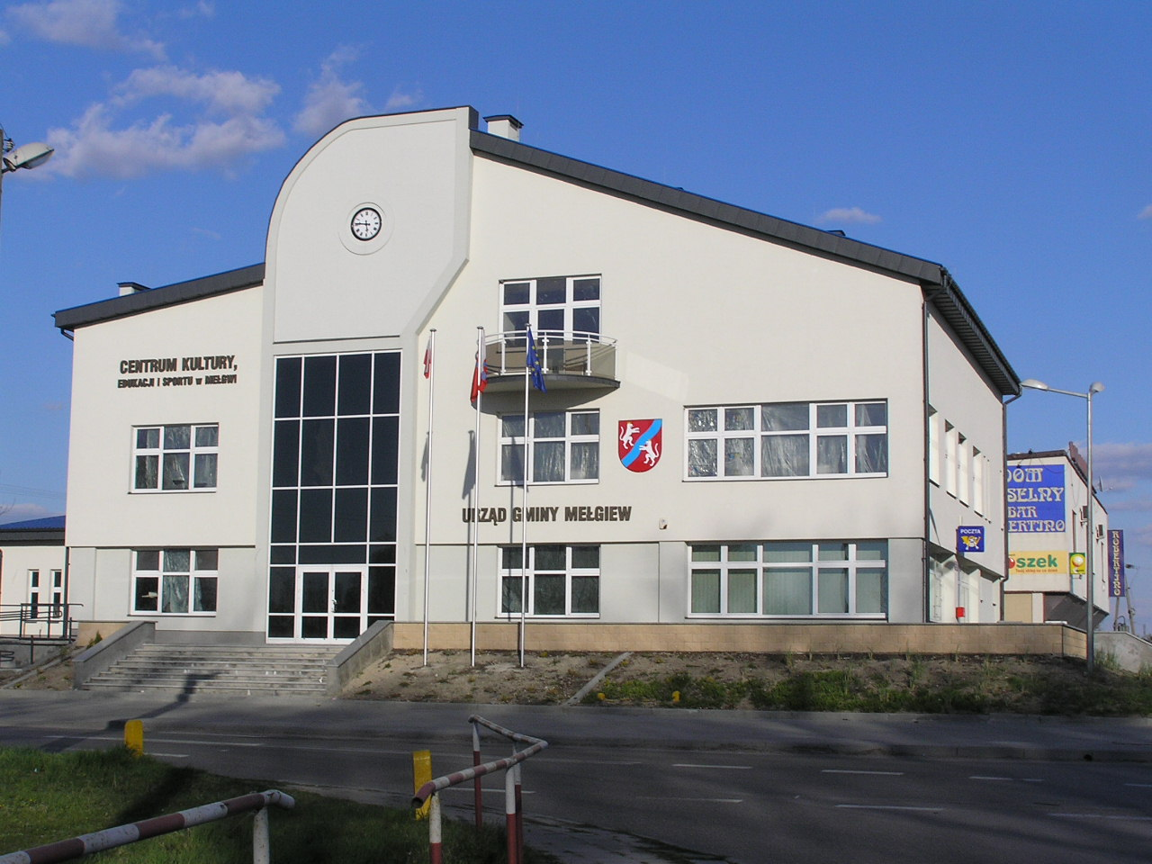 autor: Yarek shalom 11:17, 19 April 2007 (UTC)yarek shalom